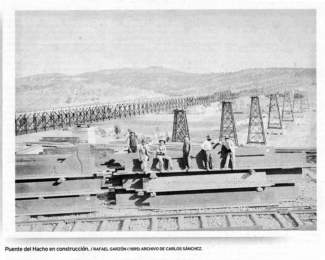 Puente del Hacho en construcción, 1895